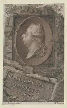 Dietrich Heinrich Ludwig Freiherr von Ompteda (1746-1803), Staatsrechtler; Komitialgesandter; kurbraunschweig. Minister. Authority control VIAF: 61980823 LCCN: n86096932 GND: 104103957 WorldCat